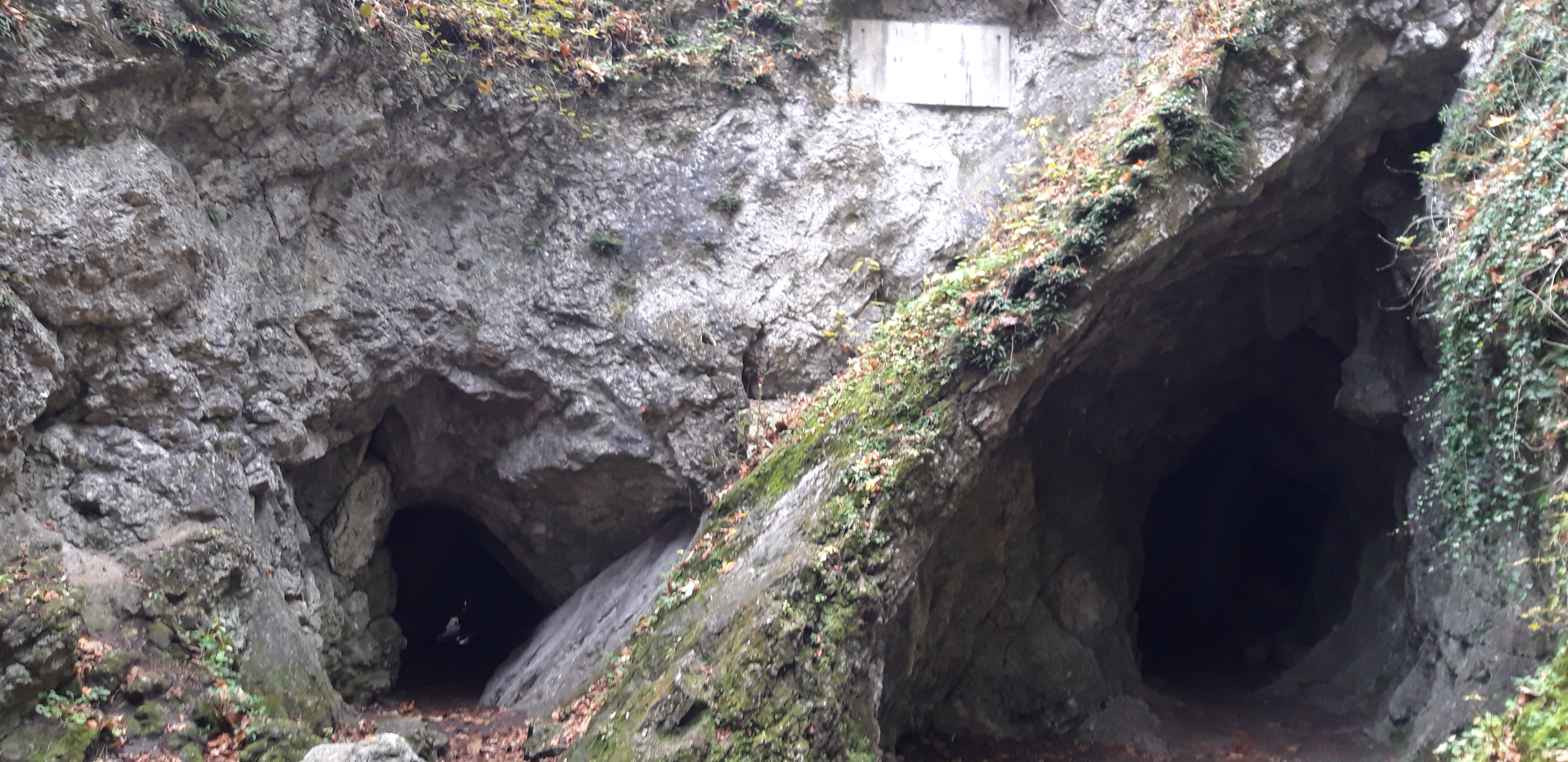 Ústí jeskyně Šipka v Moravském krasu (Štramberk), místo nálezu čelisti neandrtálského dítěte.